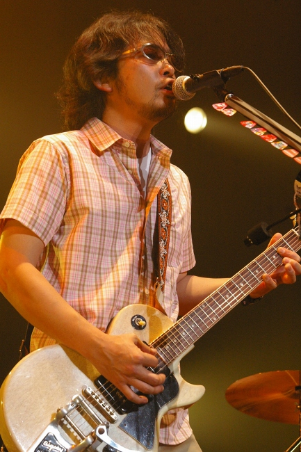 okudatamio